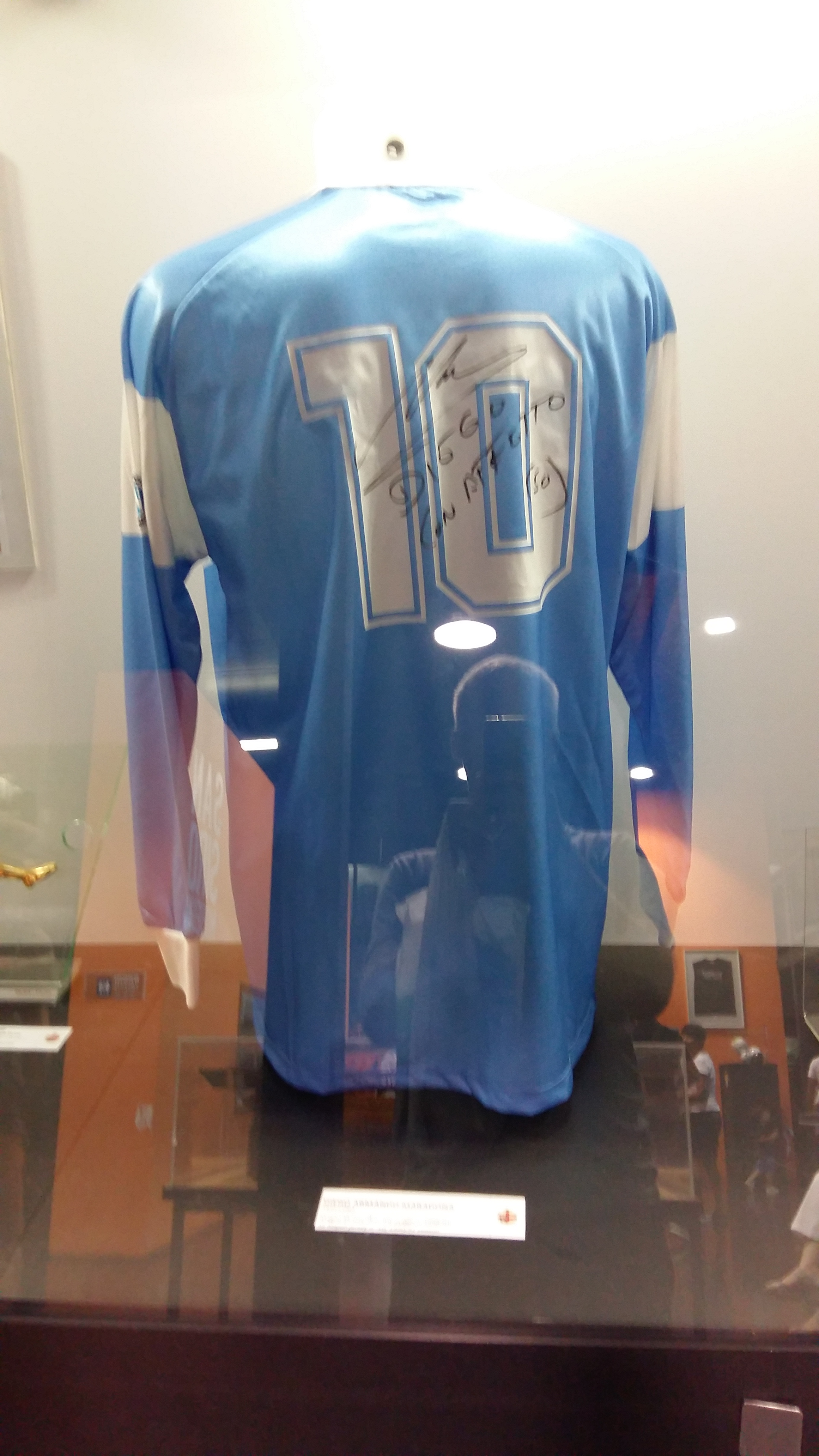 Футболка Диего Марадоны в музее Сан-Сиро.